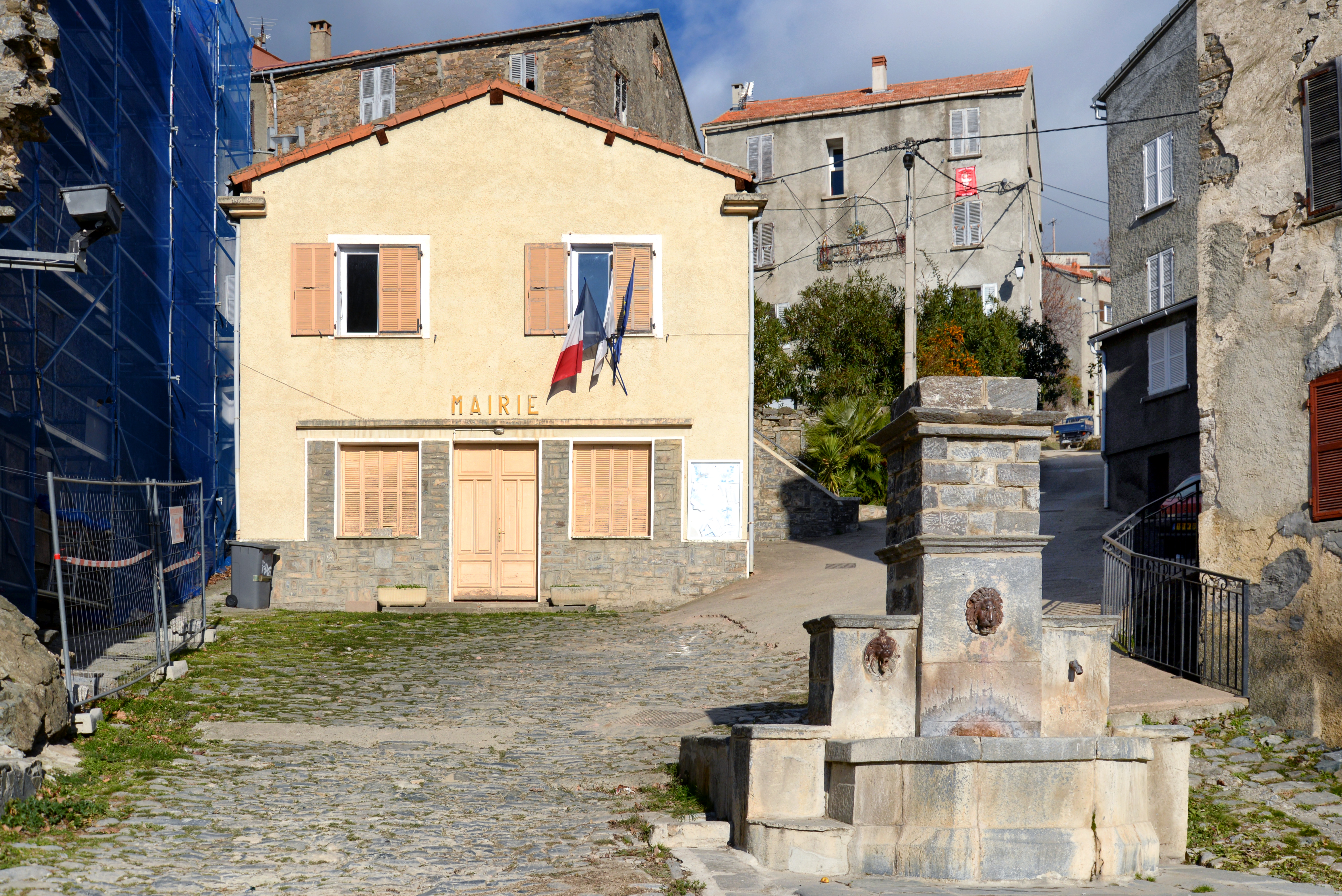 Piedicorte-di-Gaggio, Rogna (Corse) - Mairie, située à côté de l'église Notre-Dame de l'Assomption en cours de restauration.